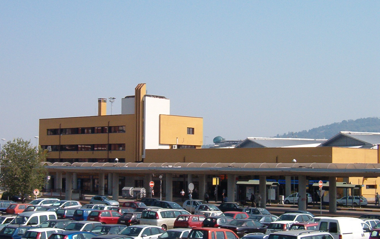 Stazione ferroviaria Torino Lingotto - Torino - Italy